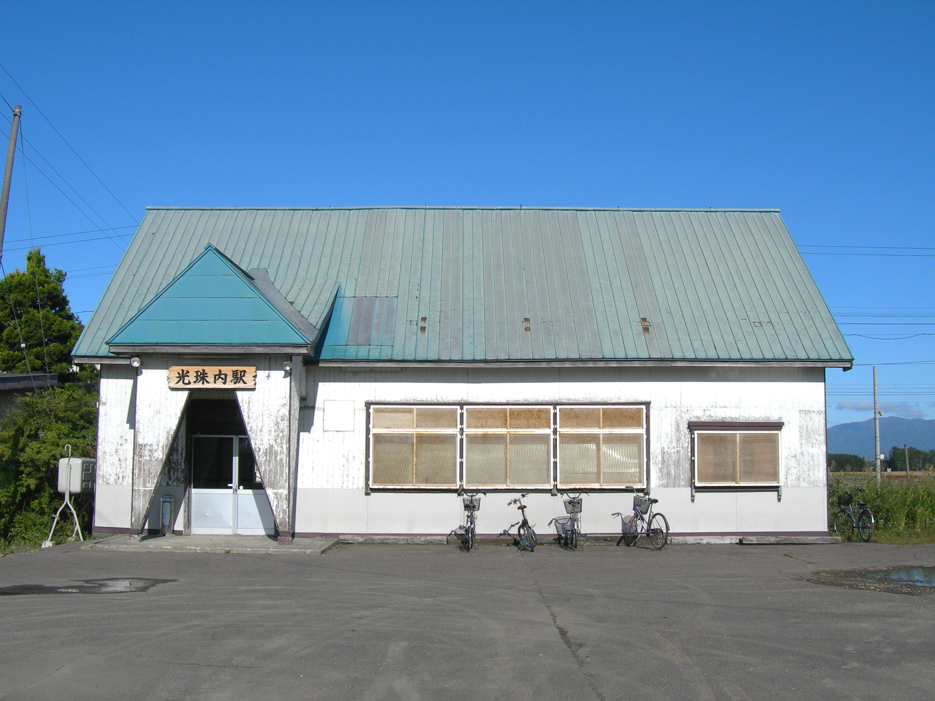 光珠内駅